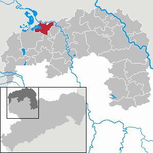 Löbnitz in Saxony - Landkreis Nordsachsen